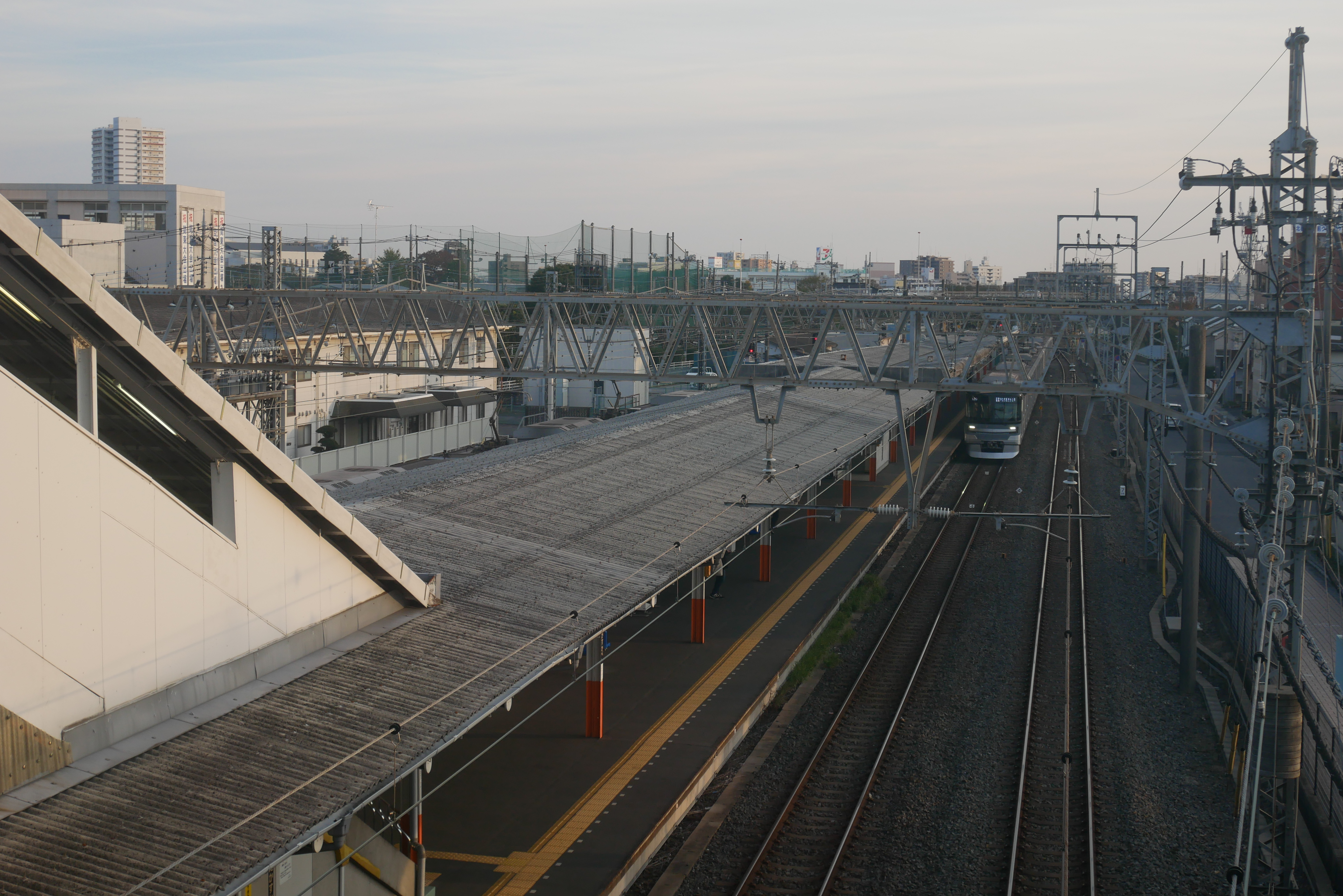 Kita-Kasukabe Station platforms (北春日部駅のホーム)